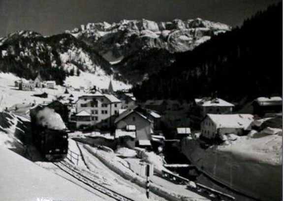 Treno con locomotiva a vapore in uscita da Selva Val Gardena